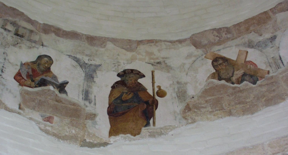 A hidegségi templom Árpád-kori freskójának részlete (Győr-Moson-Sopron megye)